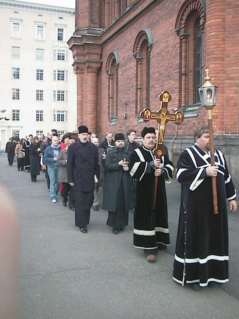 Ristisaatto Uspenskin katedraalin luona pitkäperjantaina 2003; lyhdyn ja ristin kantajilla yllään stikarit, ristin kantajalla ja hänen takanaan kahdella lukijanarvoisella laulajalla papillinen päähine, kalotti eli skufia; lyhtyä kantaa alidiakoni.